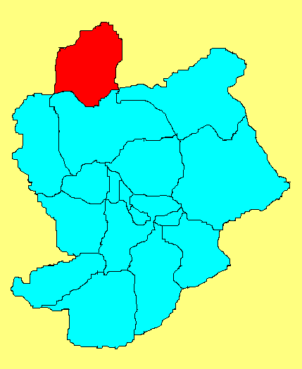 康保县在张家口市的位置；此图片由王云峰wangyunfeng原创，用于WIKI。